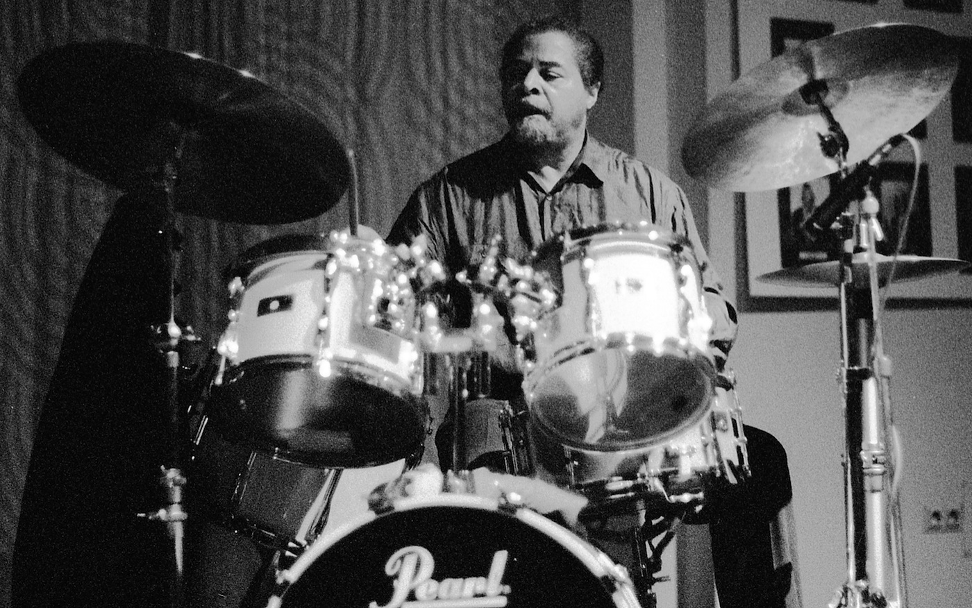 Jimmy Cobb mit dem Nat Adderley Quintett, 25.02.1993, Braunschweig